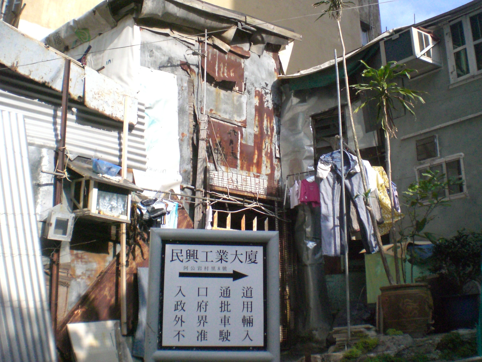 中文（香港）: 阿公岩村道寮屋